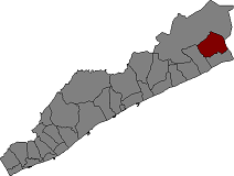 Localització de Palafolls al Maresme